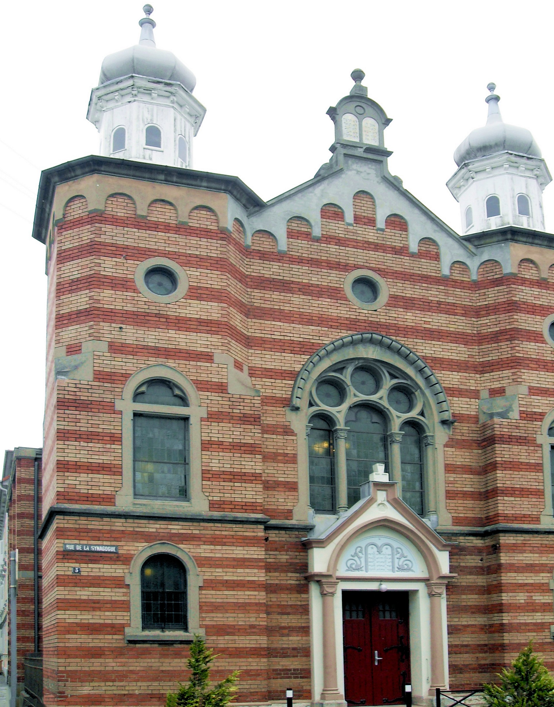 Synagogue de Saint-Louis, côté ouest